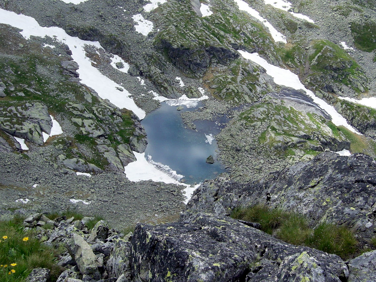 Zadni Staw Gąsienicowy z Kościelca